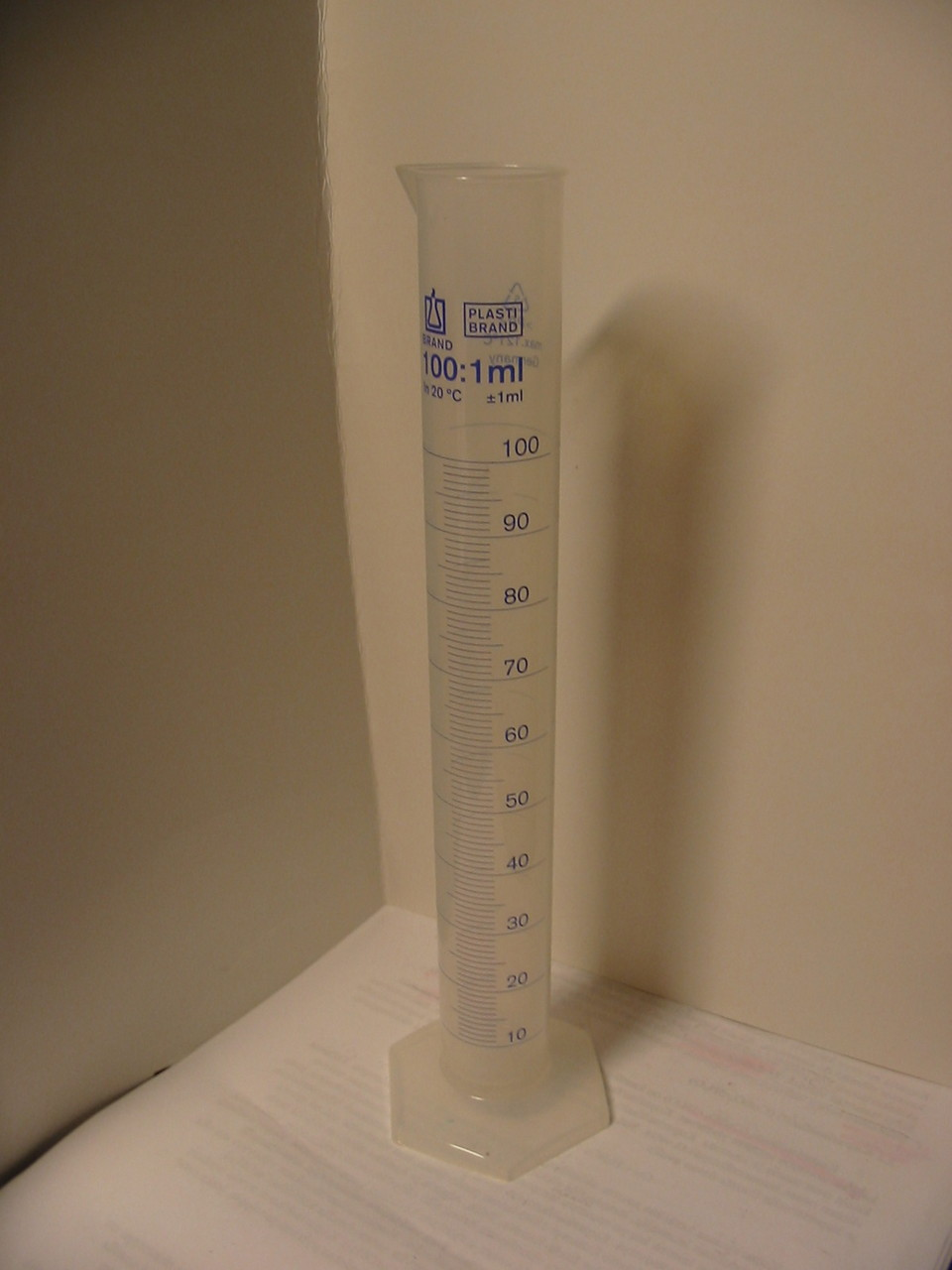 100 ml muovinen mittalasi.